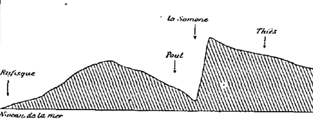 "Coupe schématique de Thiès à Rufisque", dans La Géographie, tome IV, 15 juillet 1901, p. 7